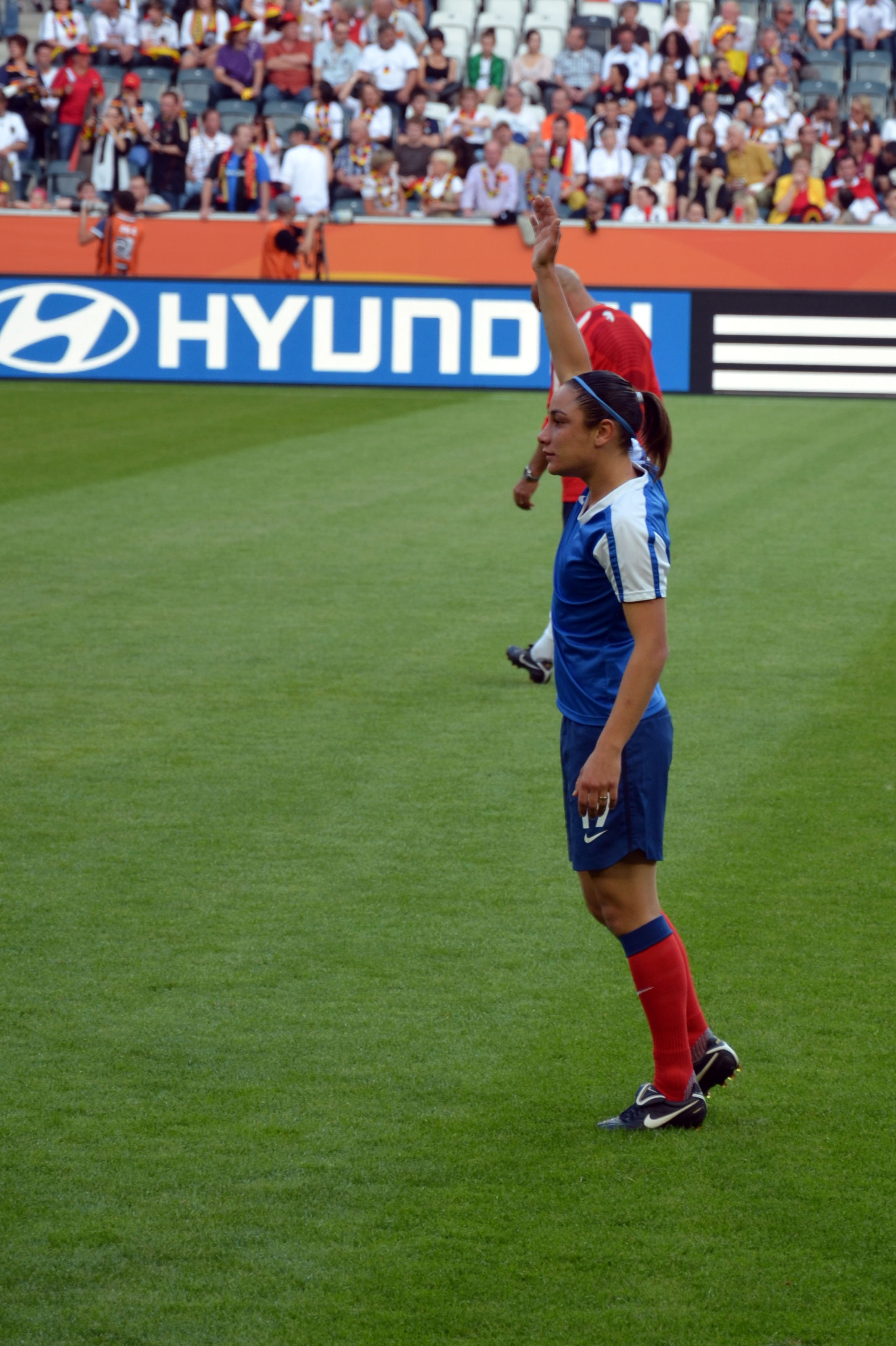 WM Vorrundenspiel zwischen Frankreich und Deutschland am 5. Juli 2011 im Borussiapark in Mönchengladbach Sandrine Brétigny (19)